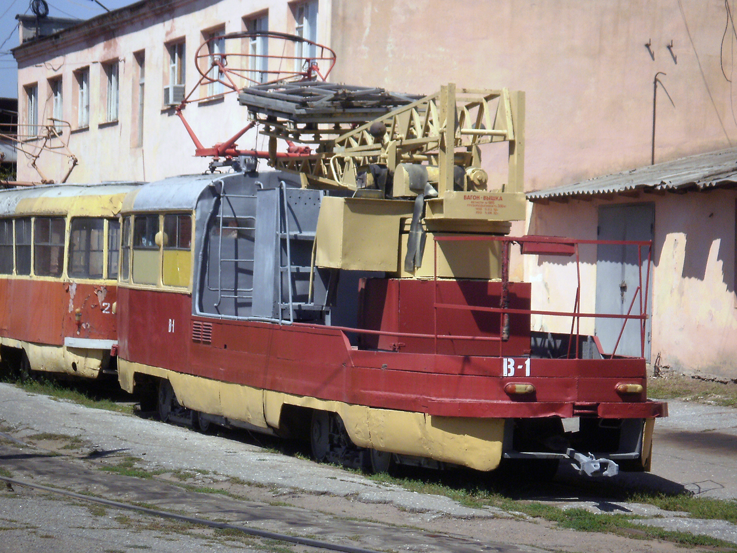 Одесское трамвайное депо №1